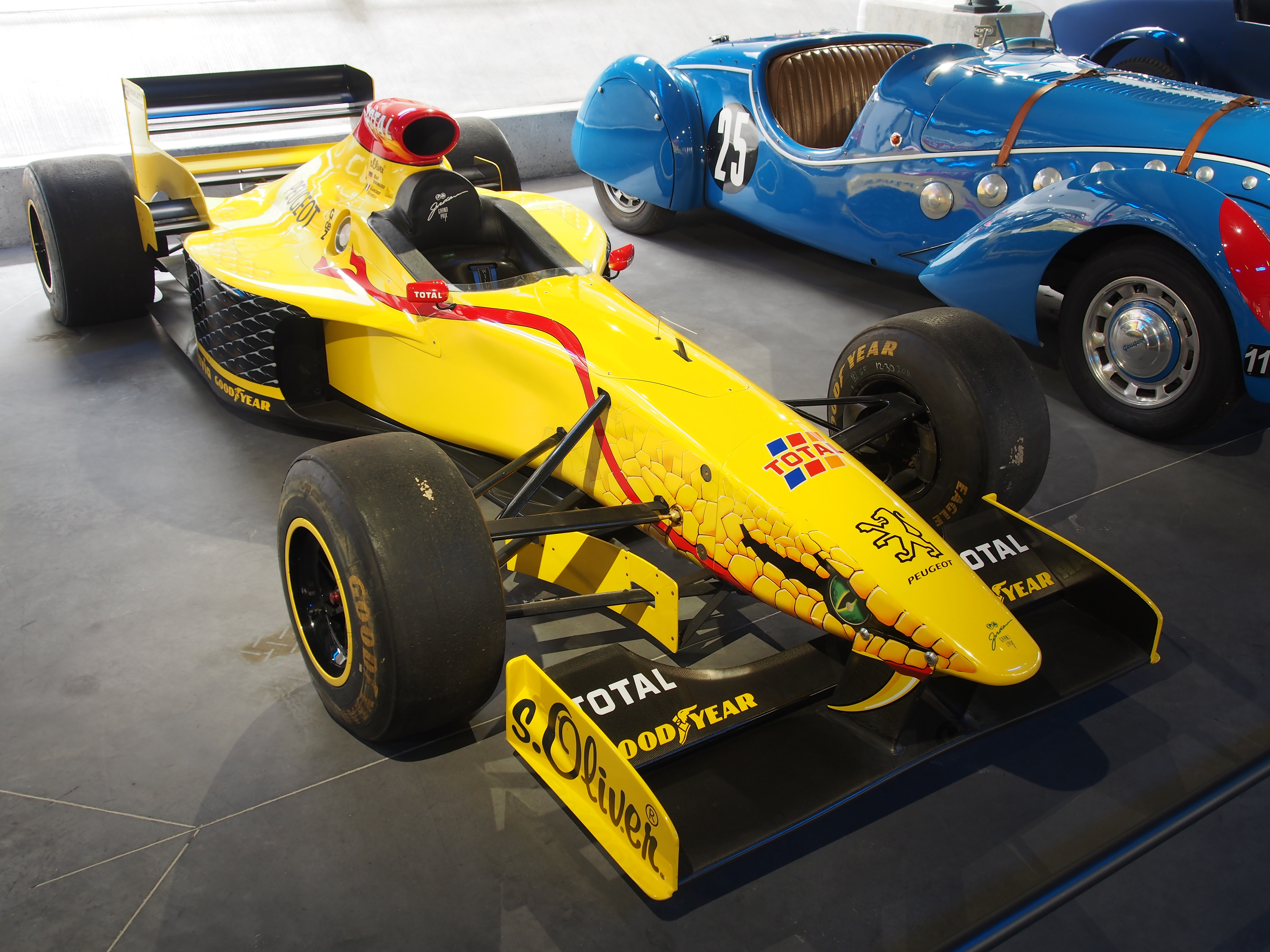 Photographed at the Musée de l'Aventure Peugeot-Sochaux, France.